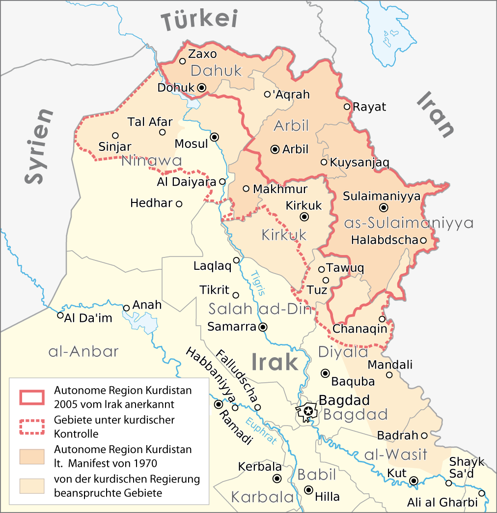 Karte: Autonome Region Kurdistan